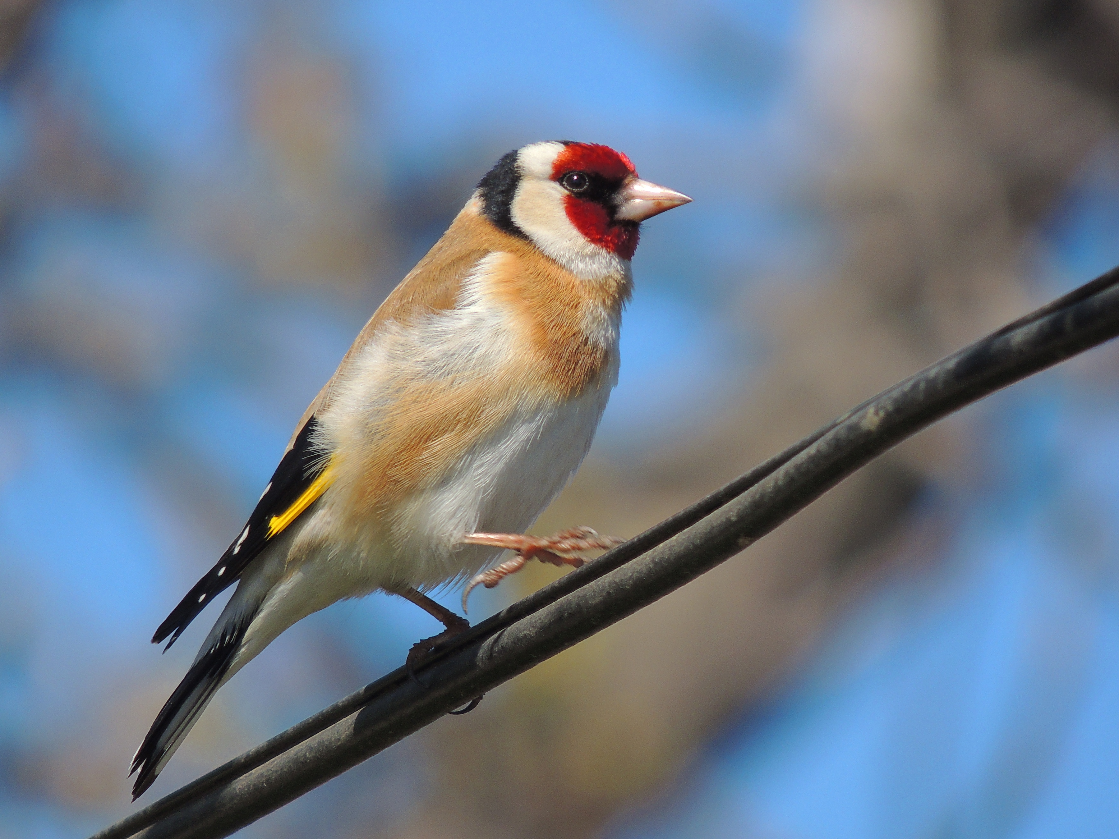 goldfinch Stieglitz sticlete